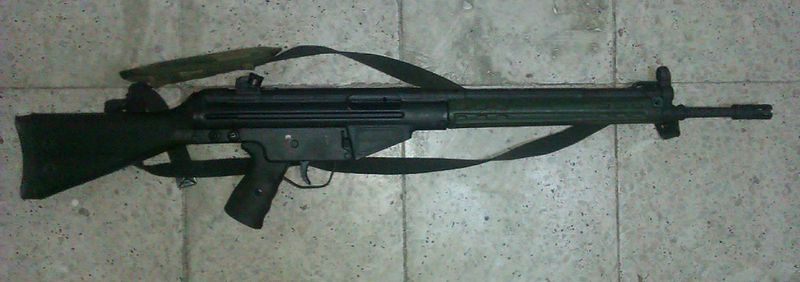 G3 Piyade tüfeği fotoğrafı